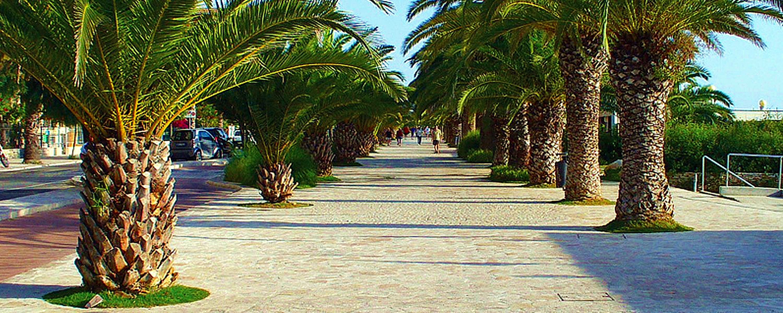 Pista ciclabile e zona pedonale fra le palme sul lungomare sud di San Benedetto del tronto